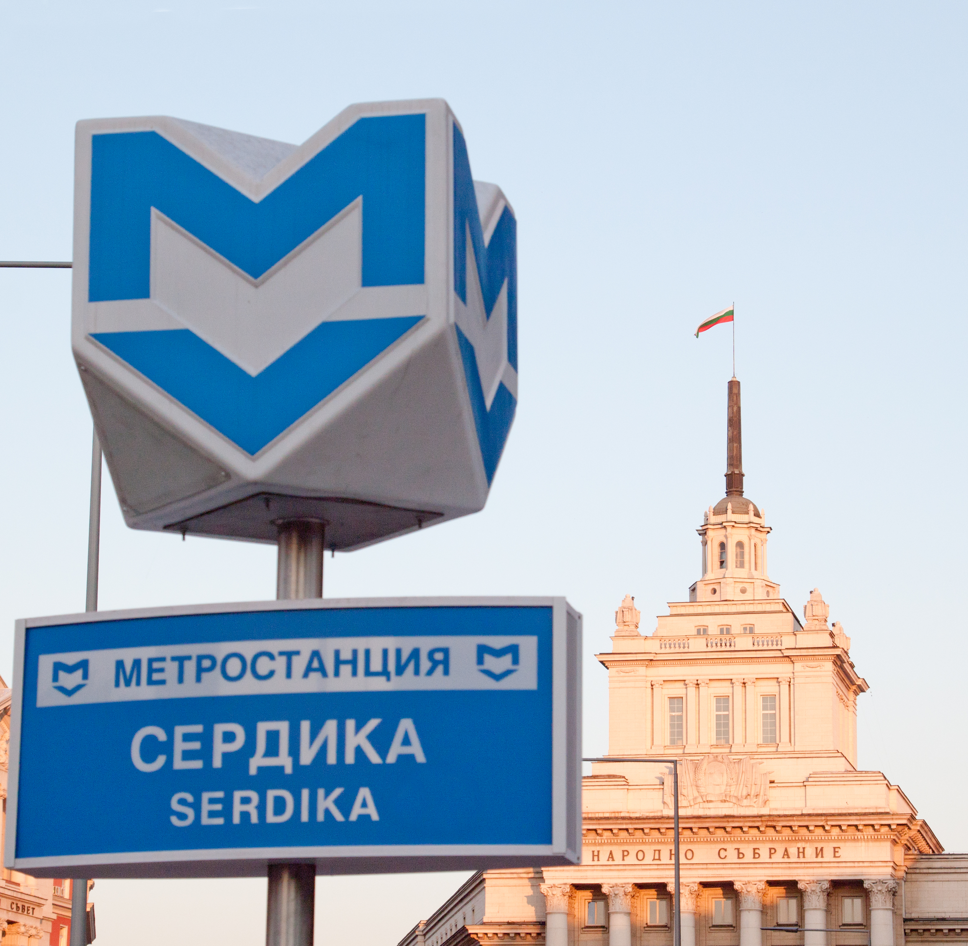 Stadtzentrum Sofia; Rundgang durch das Stadtzentrum, kostenlos, in englisch, täglich 11 und 18 Uhr ab große Treppe des Justizpalastes; gesamte Zentrum; bis Parlament, zwei Stunden; Trinkgelder willkommen